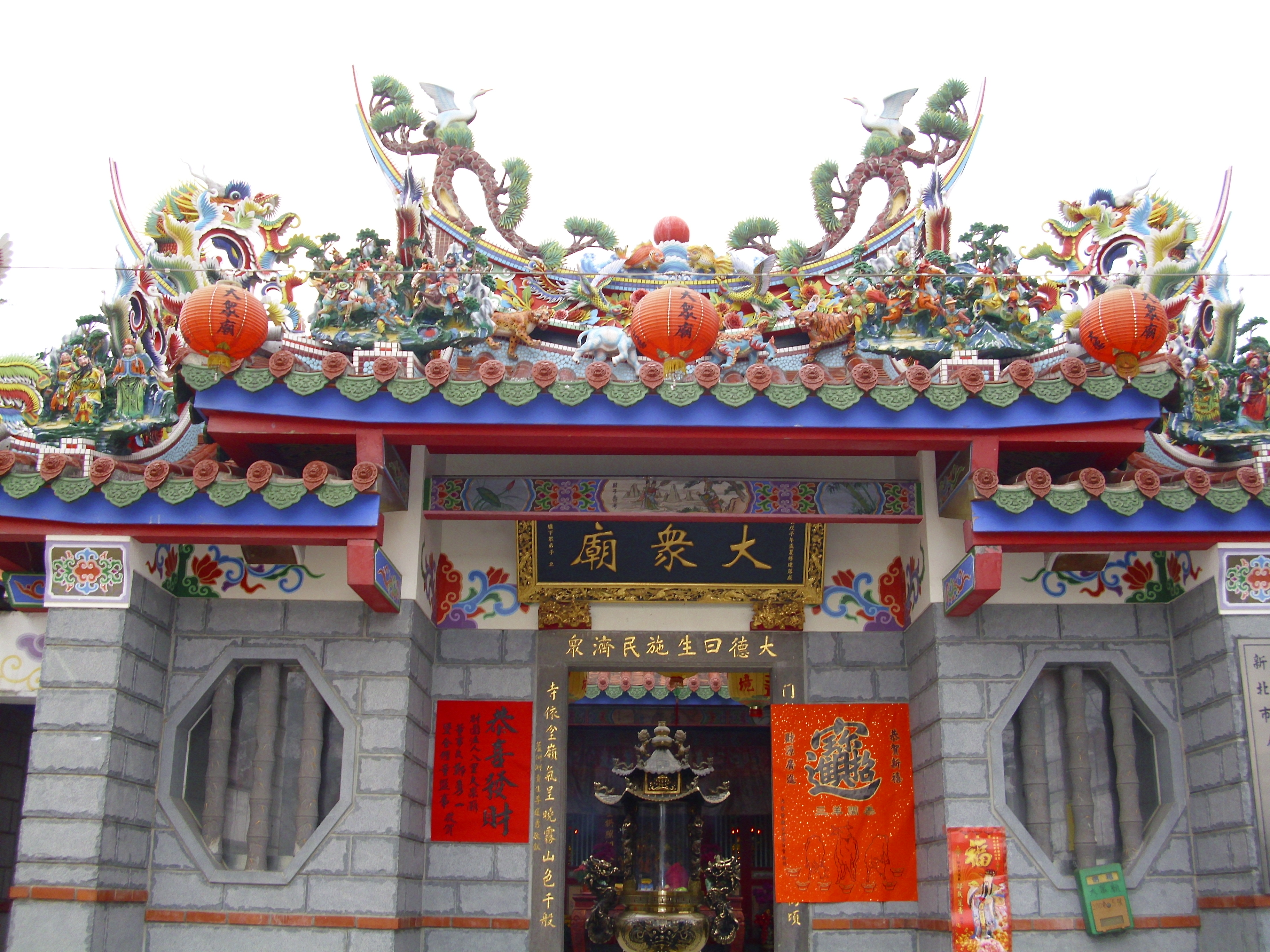 八里大眾廟